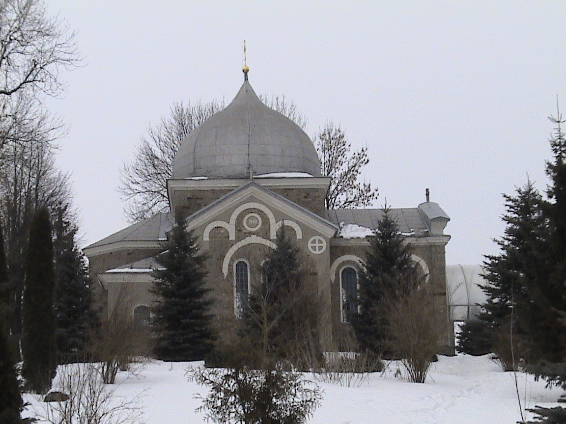 Церква в Байківцях: Вигляд збоку